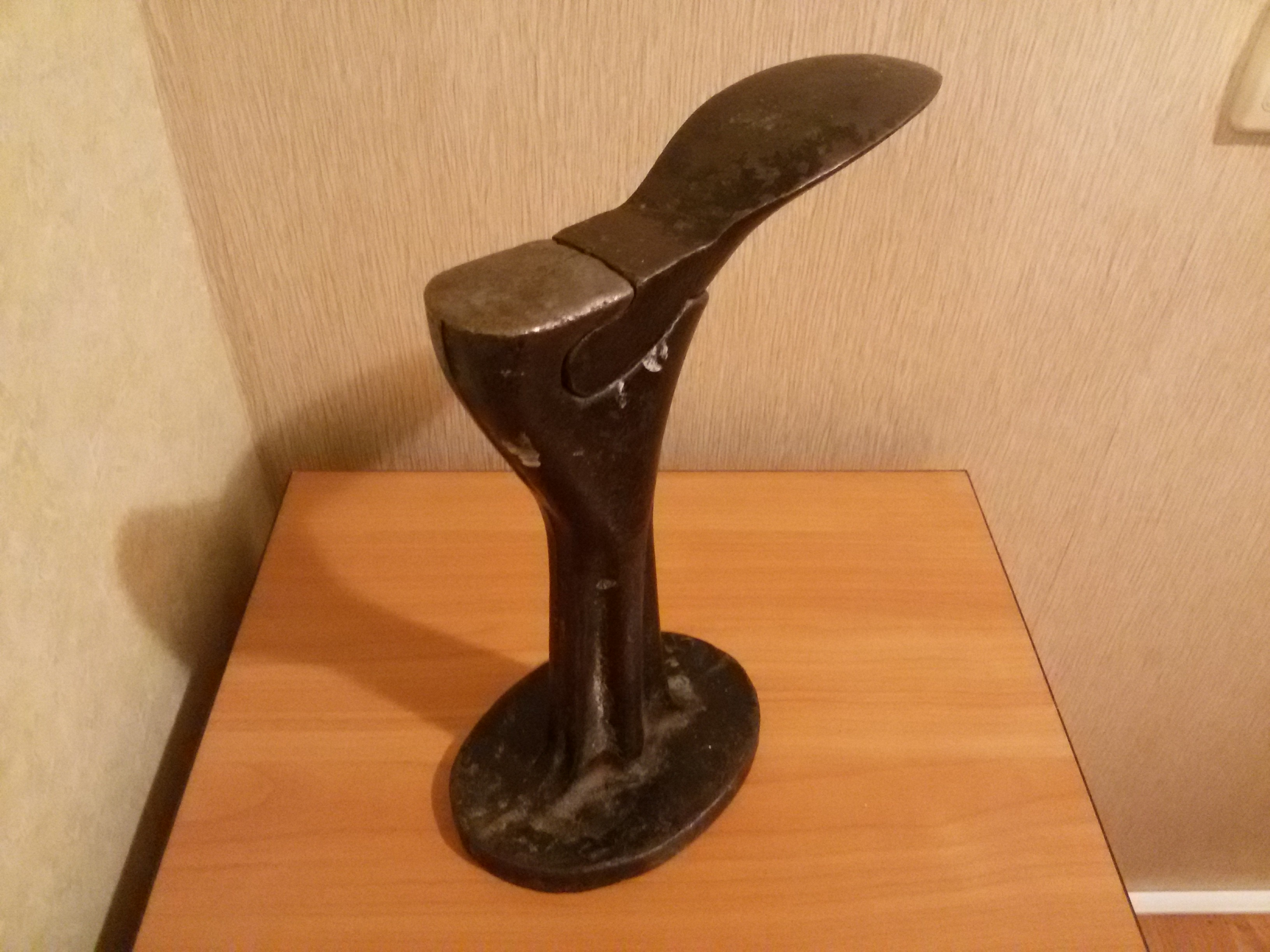 Лапа сапожная 2